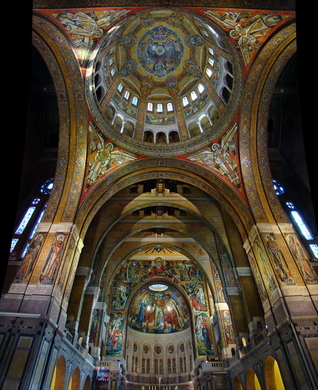 Basilique Sainte-Thérèse de Lisieux, Calvados, Normandie, France.